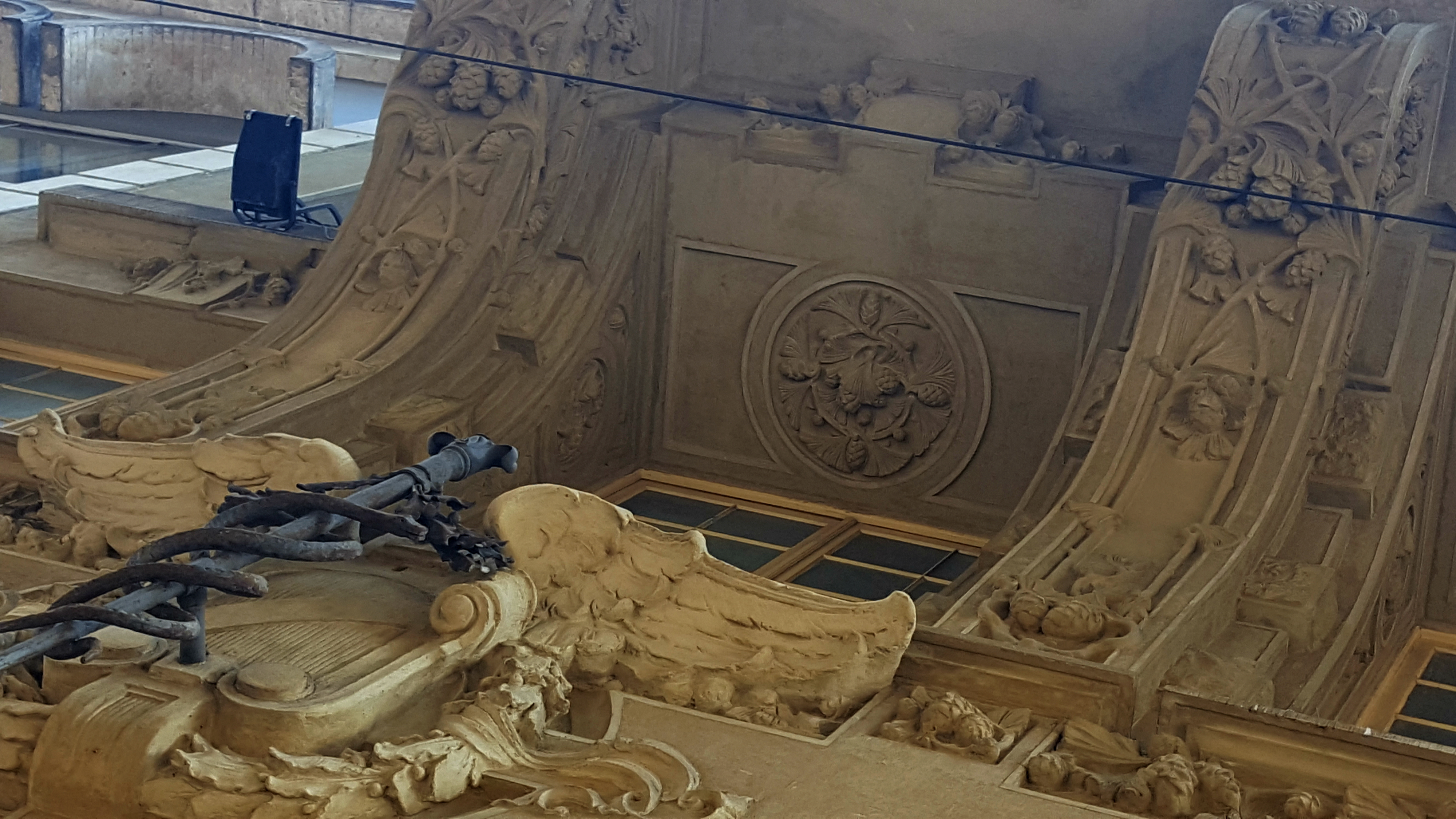 Detalhes do lado direito do Edifício Guinle, em São Paulo (SP), Brasil